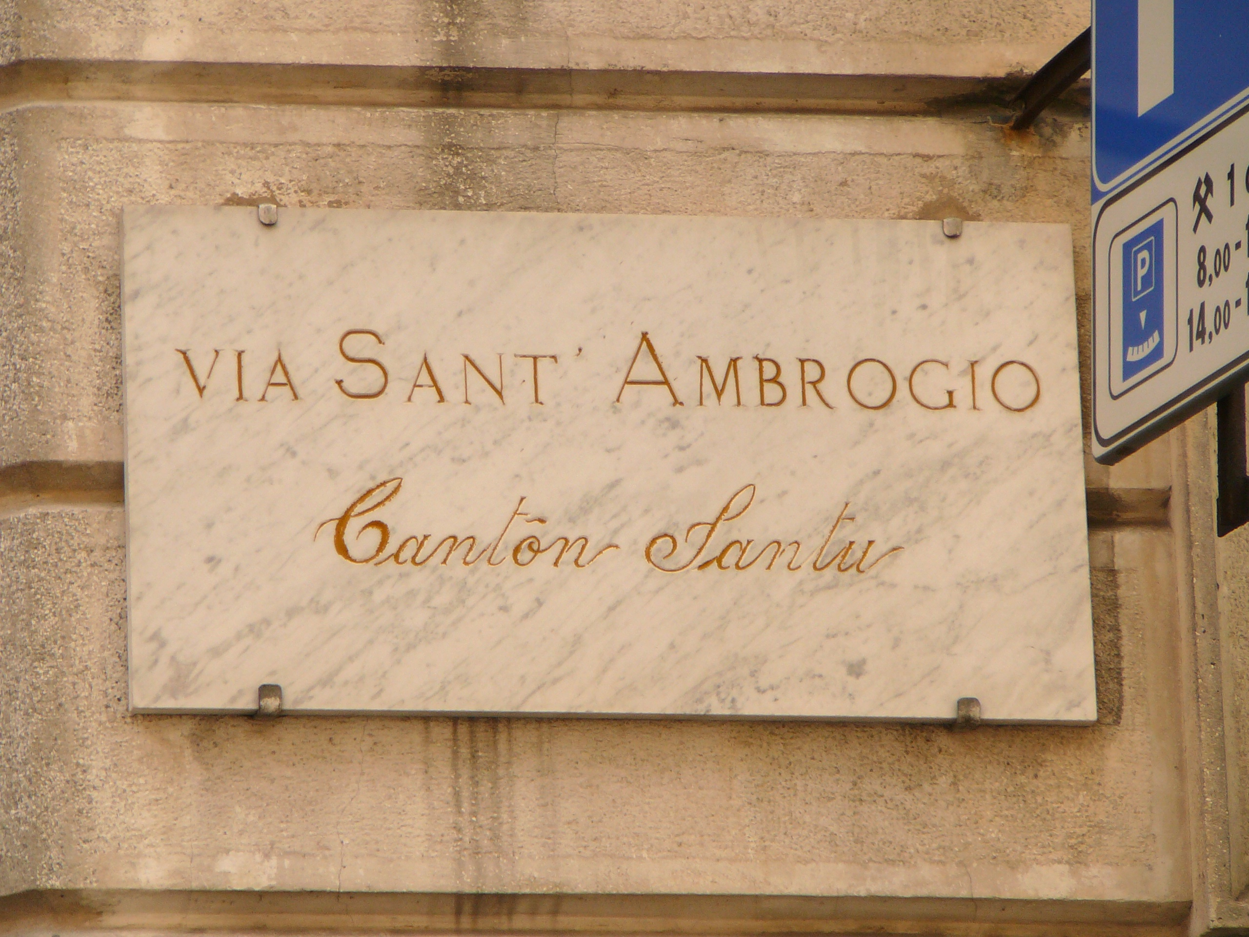 Via Sant'Ambrogio - Canton Santo